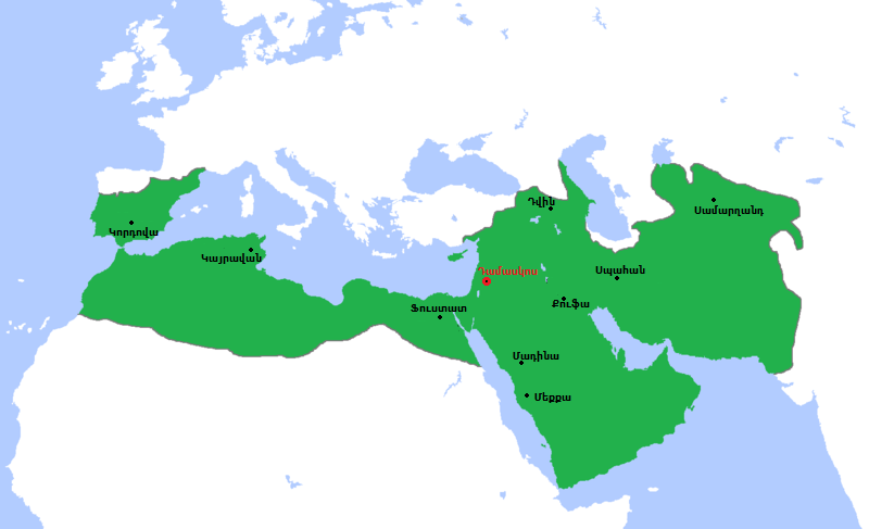 Օմայյան խալիֆայությունը առավելագույն ընդարձակման ժամանակ